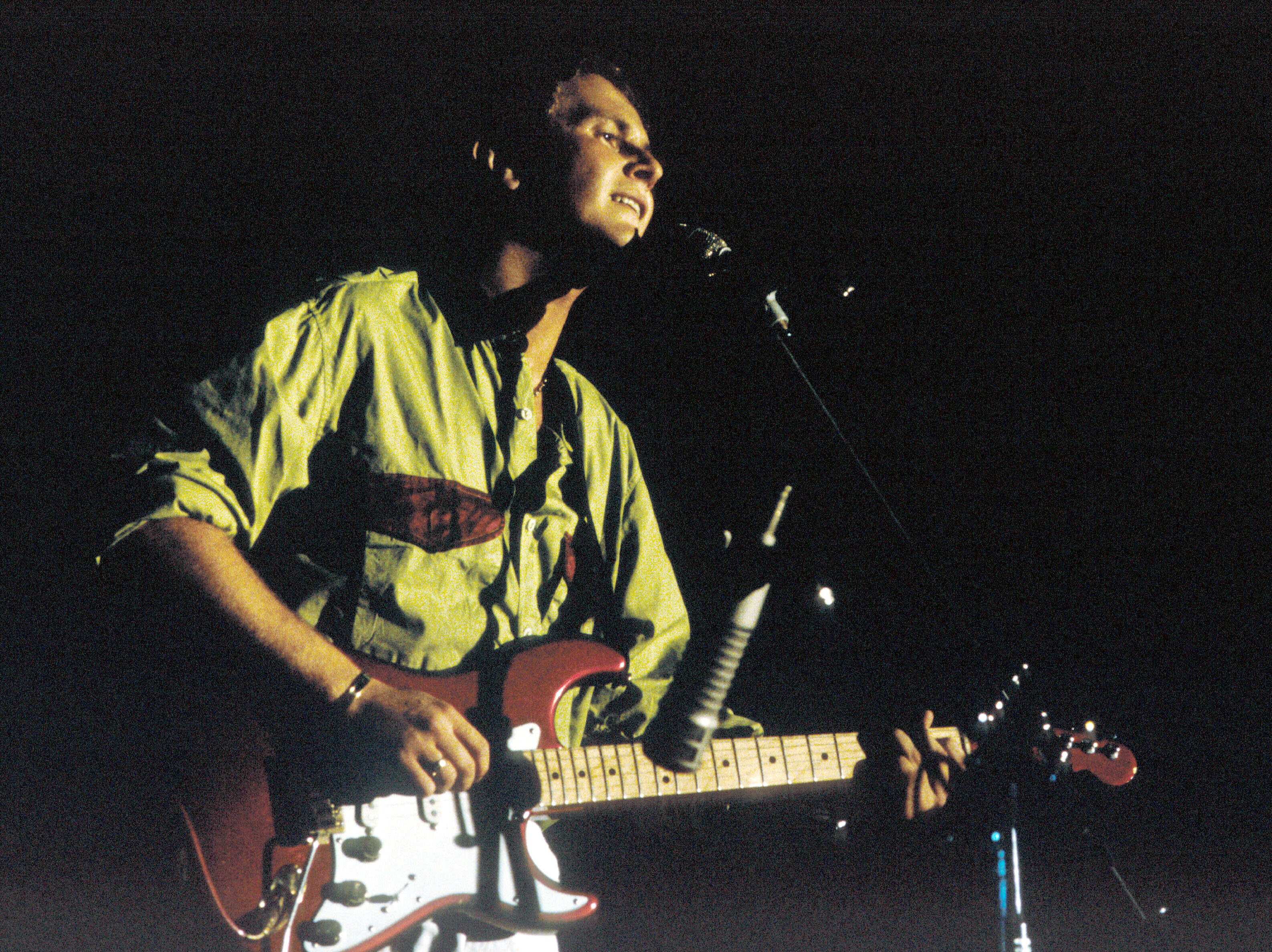 Il cantante Ron, alias Rosalino Cellamare, in un concerto dei primi anni 90 del XX secolo.